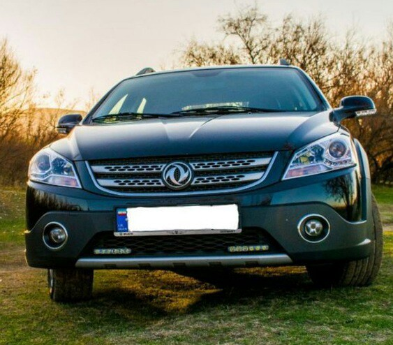 اچ سی کراس